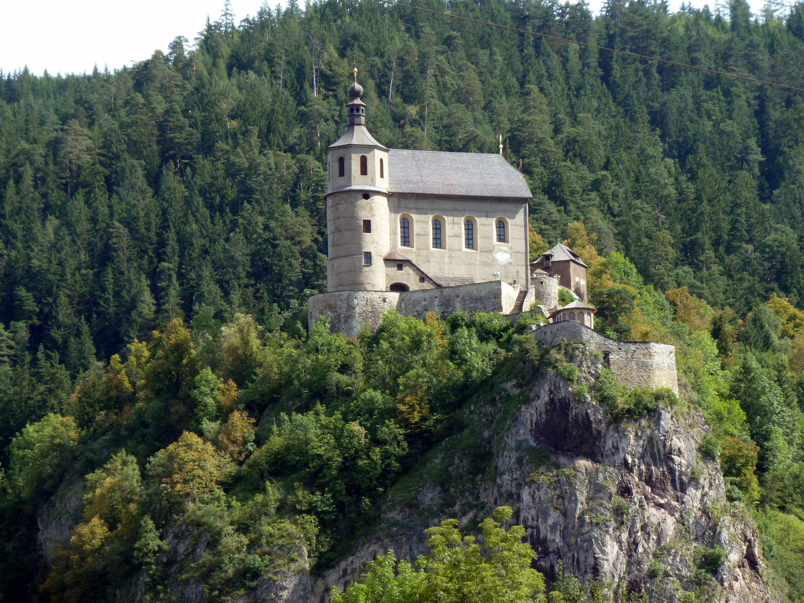 Wallfahrtskirche Maria Freienstein